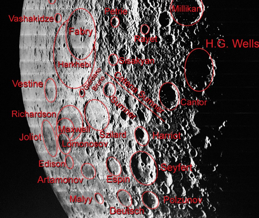 Catena Sumner en la Luna. (Imagen Lunar Órbiter)